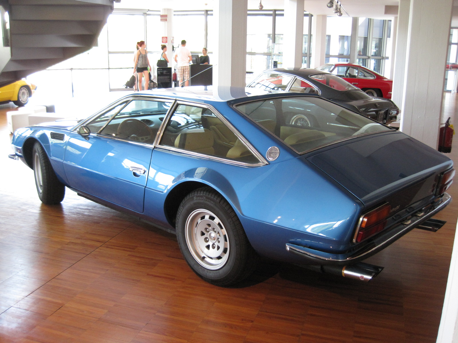 Musée Lamborghini - Jarama 400 GT